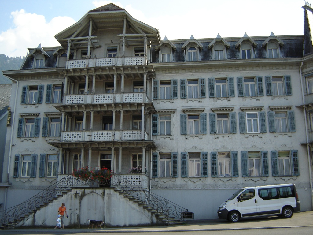 Hotelo Krone en Buochs.